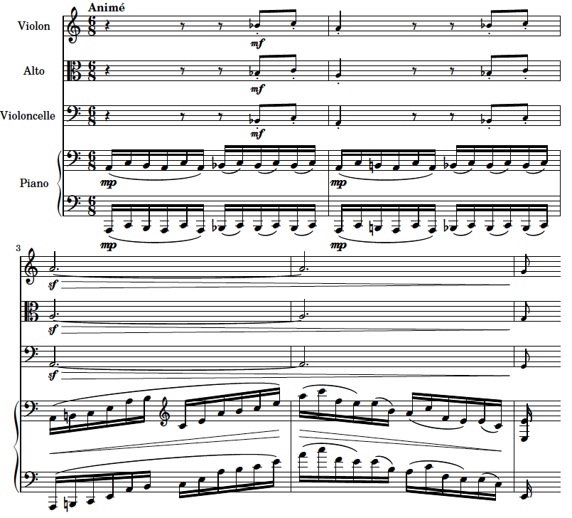 Exemple 1 créé avec Lilypond